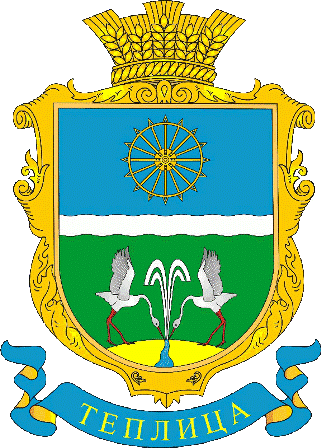 Герб села Теплиця